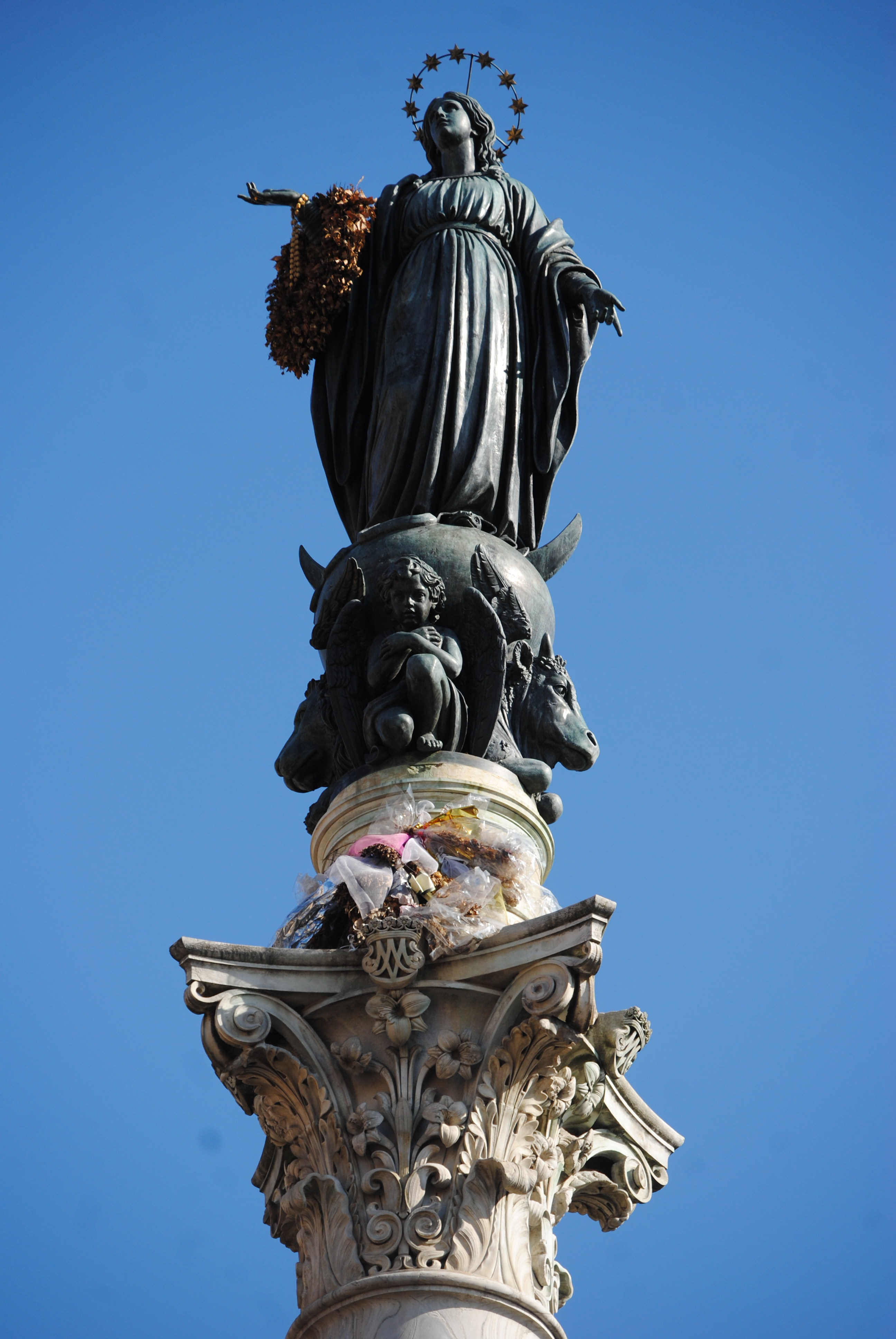 Statua dell'Immacolata sulla Colonna omonima a Roma.